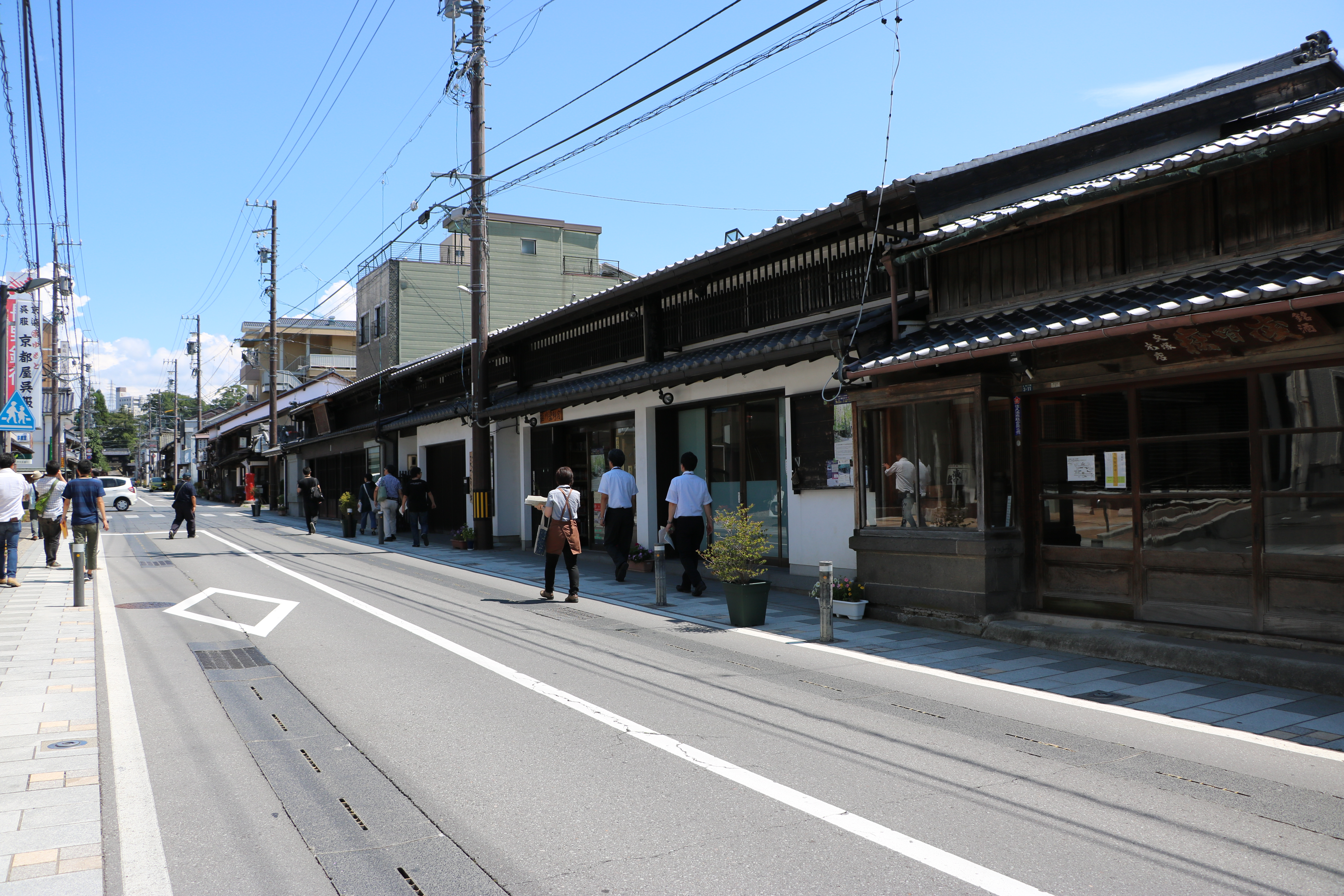 北国街道に面した小諸市の商家（長野県小諸市）